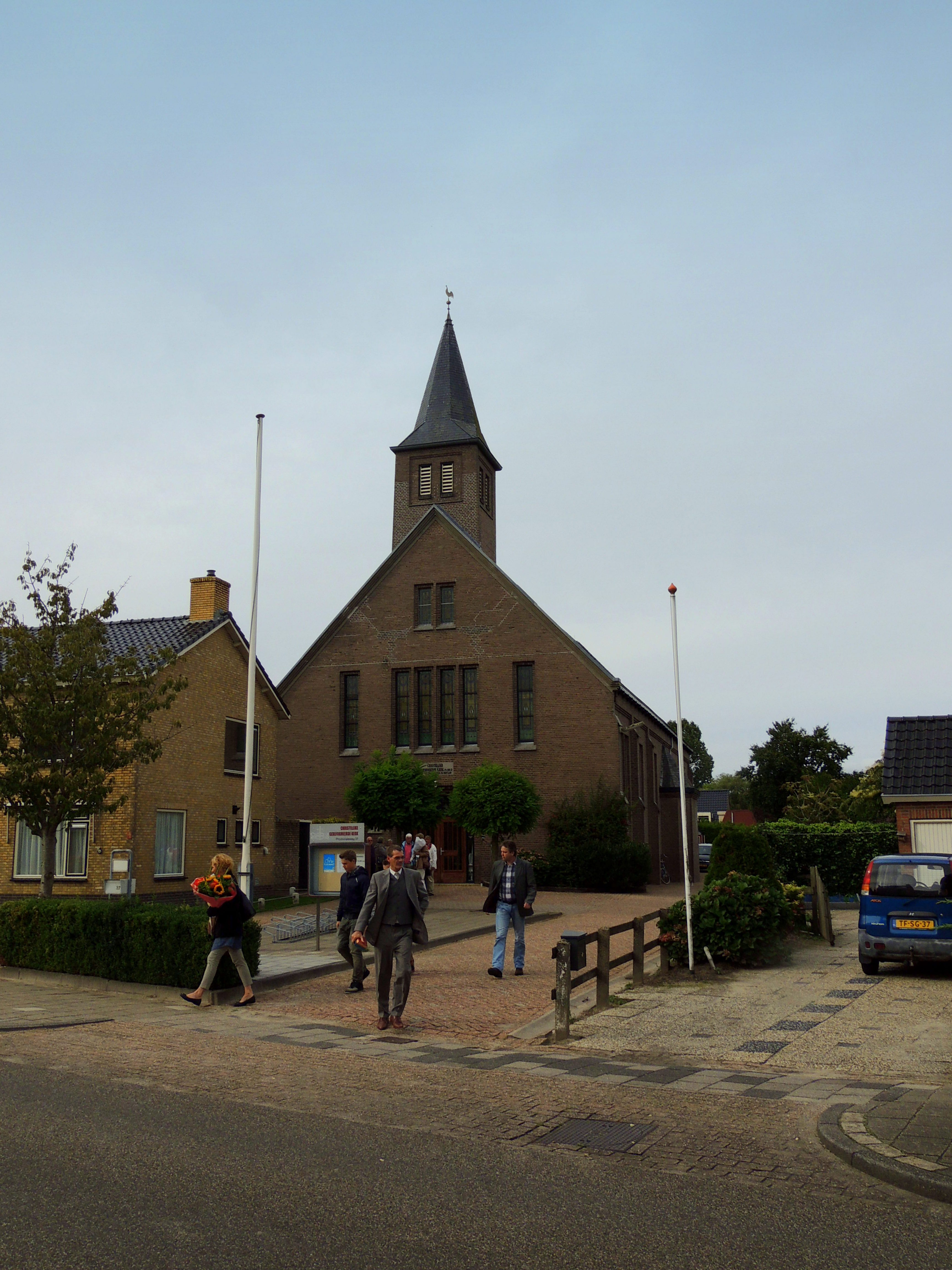 Kerk Provincialeweg Kornhorn